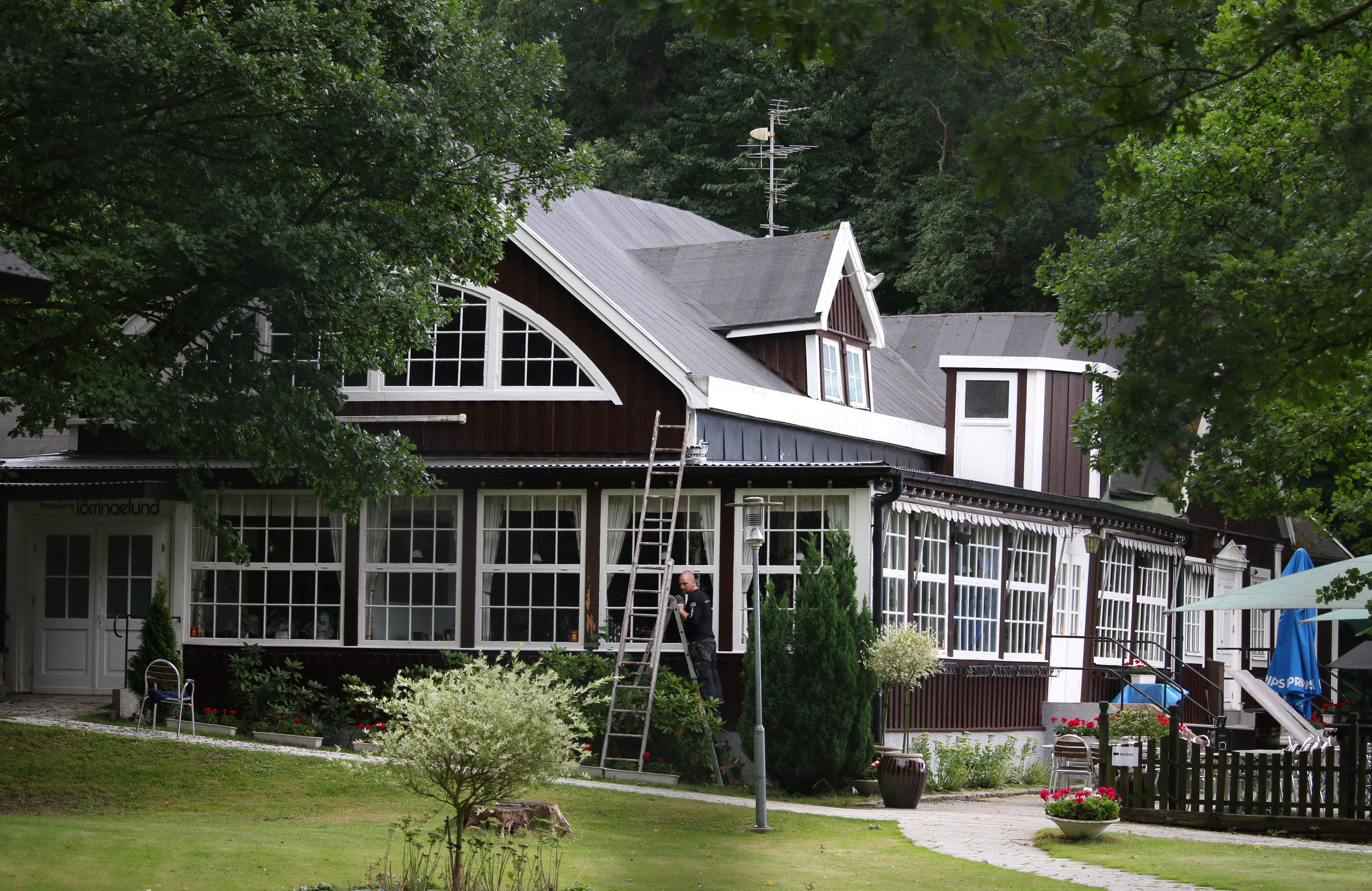 Törringelunds resturang